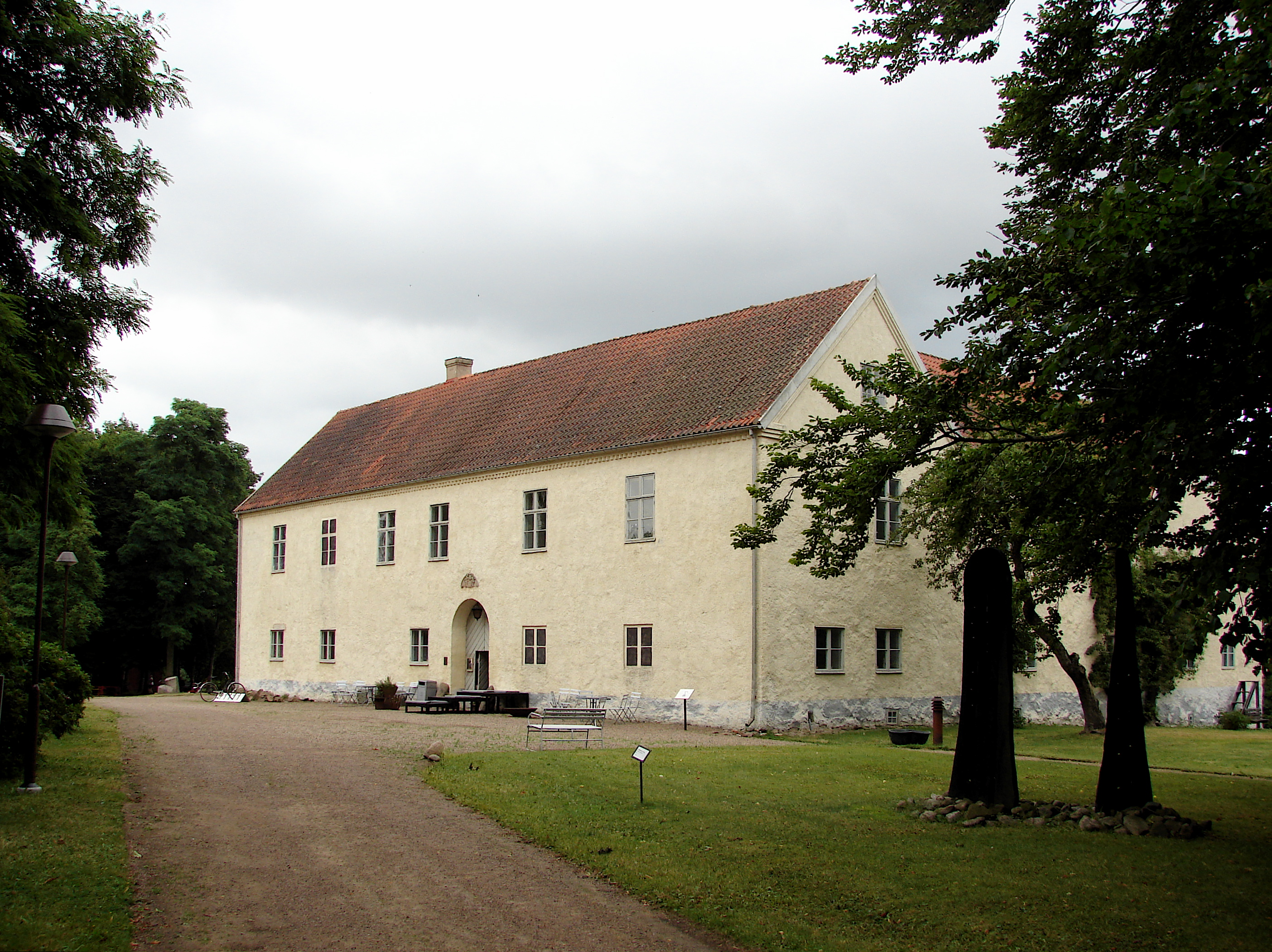 Tommerup, Tommarp Kungsgård, Skåne, Scania